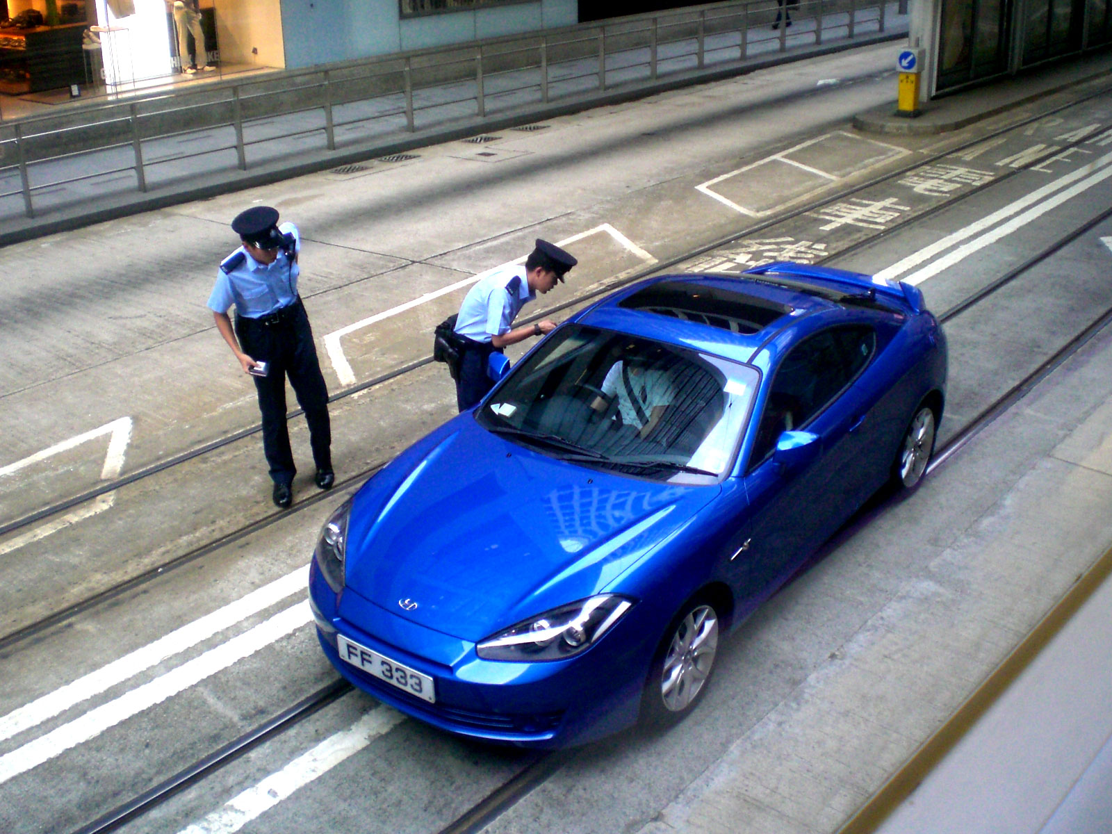 小汽車在zh:香港島zh:中環德輔道中zh:公車專用道zh:迷路